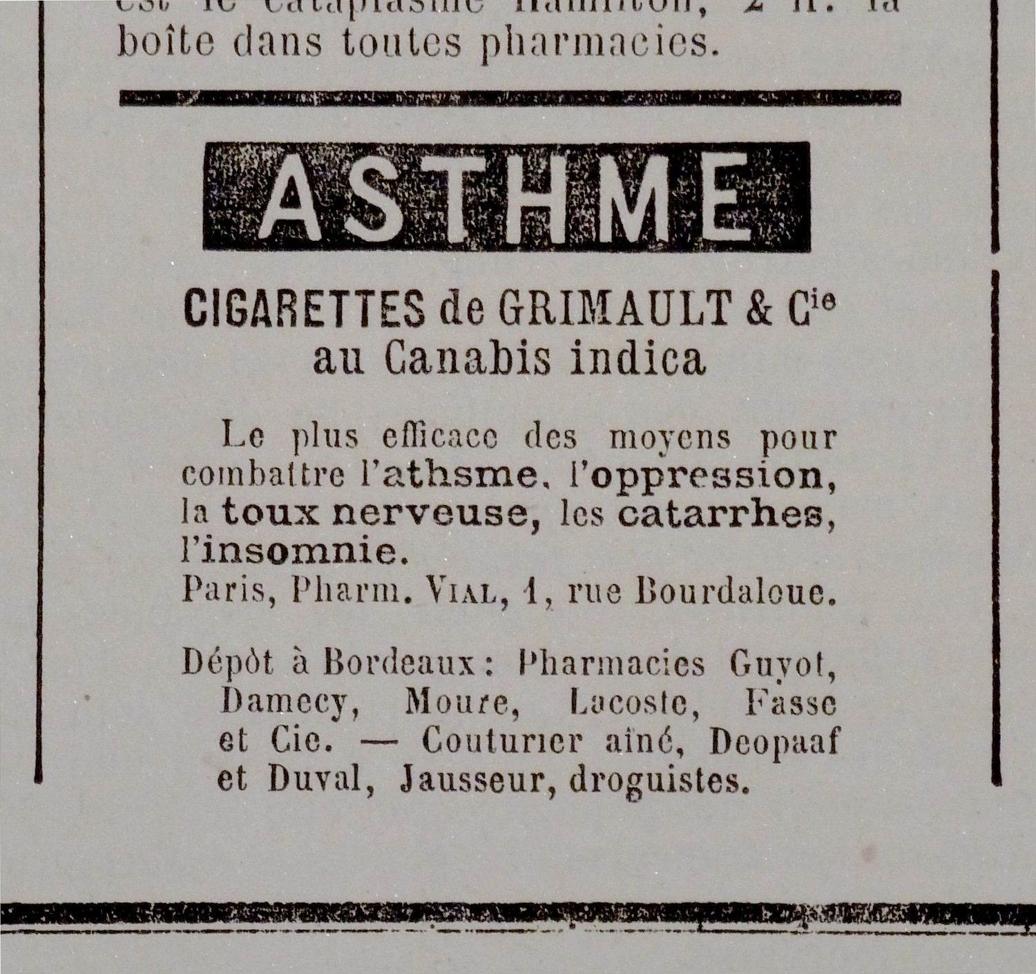 Publicité pour les cigarettes Grimault et Cie au canabis indica, parue en 1883 dans le journal satirique Le Don Quichotte (n°465, 10ème année, 18 mai 1883). Photo personnelle sur l'exemplaire, page 4. dimension de l'encart 5,5 x 5,5 cm.